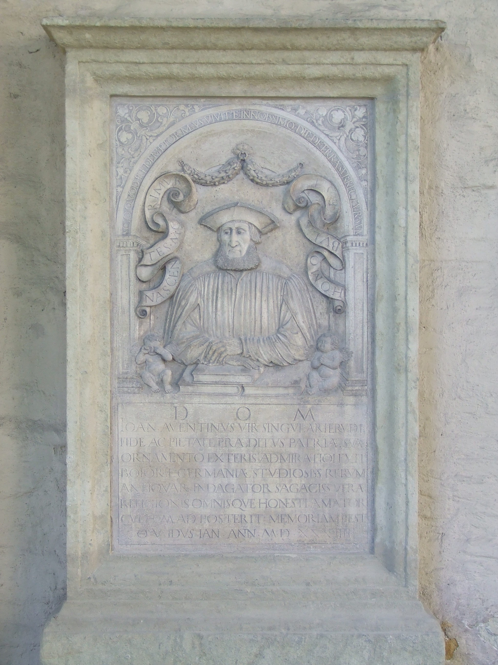 Stadt Regensburg, Vorhof der Klosterkirche St. Emmeram, Grabplatte von Aventinus (Johannes Turmair), dem Vater der Bayerischen Geschichtsschreibung.